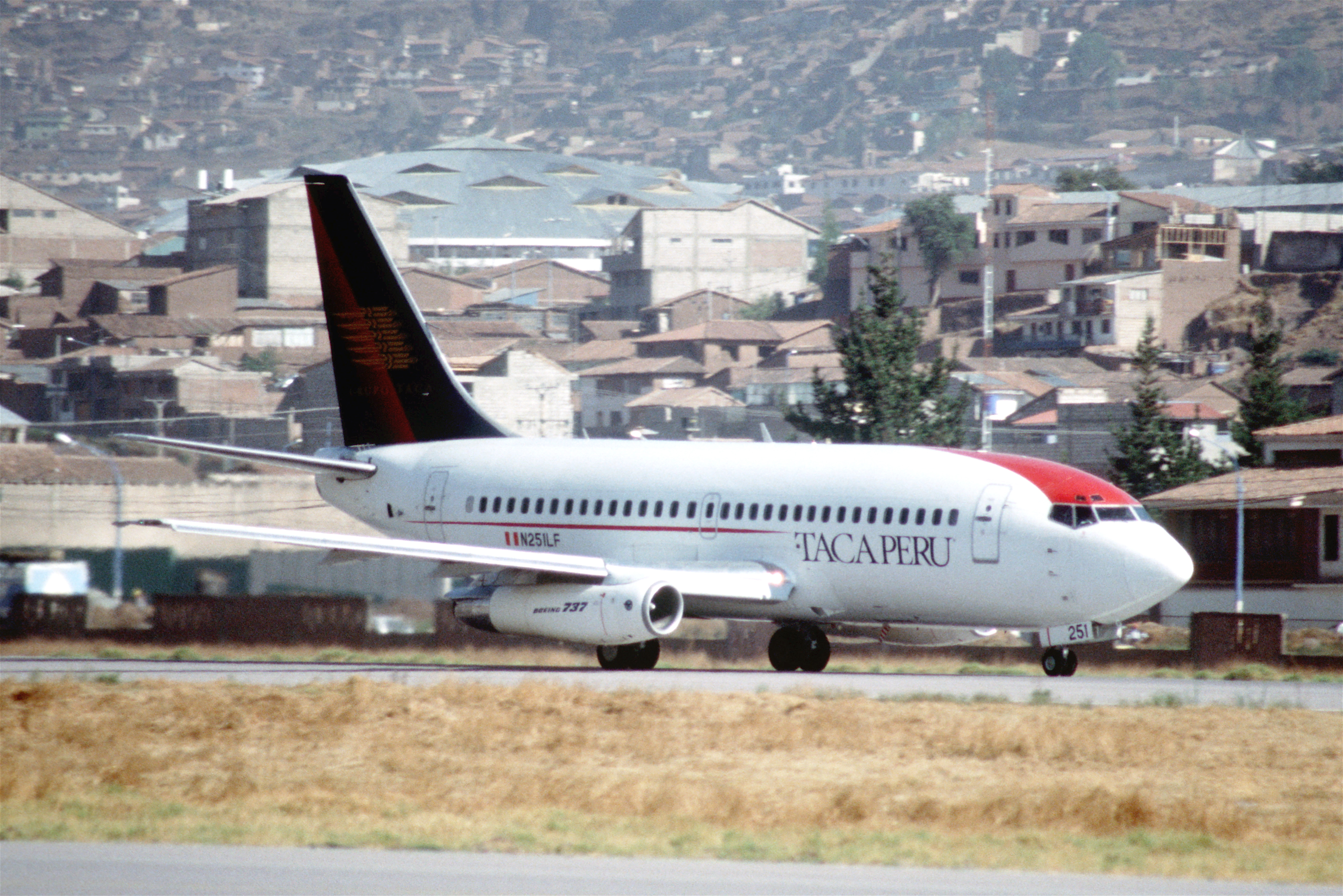 110am - TACA Peru Boeing 737-2L9; N251LF@CUZ;29.09.2000